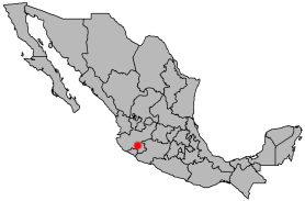 Locator map of Ciudad Guzmán, Jalisco, Mexico